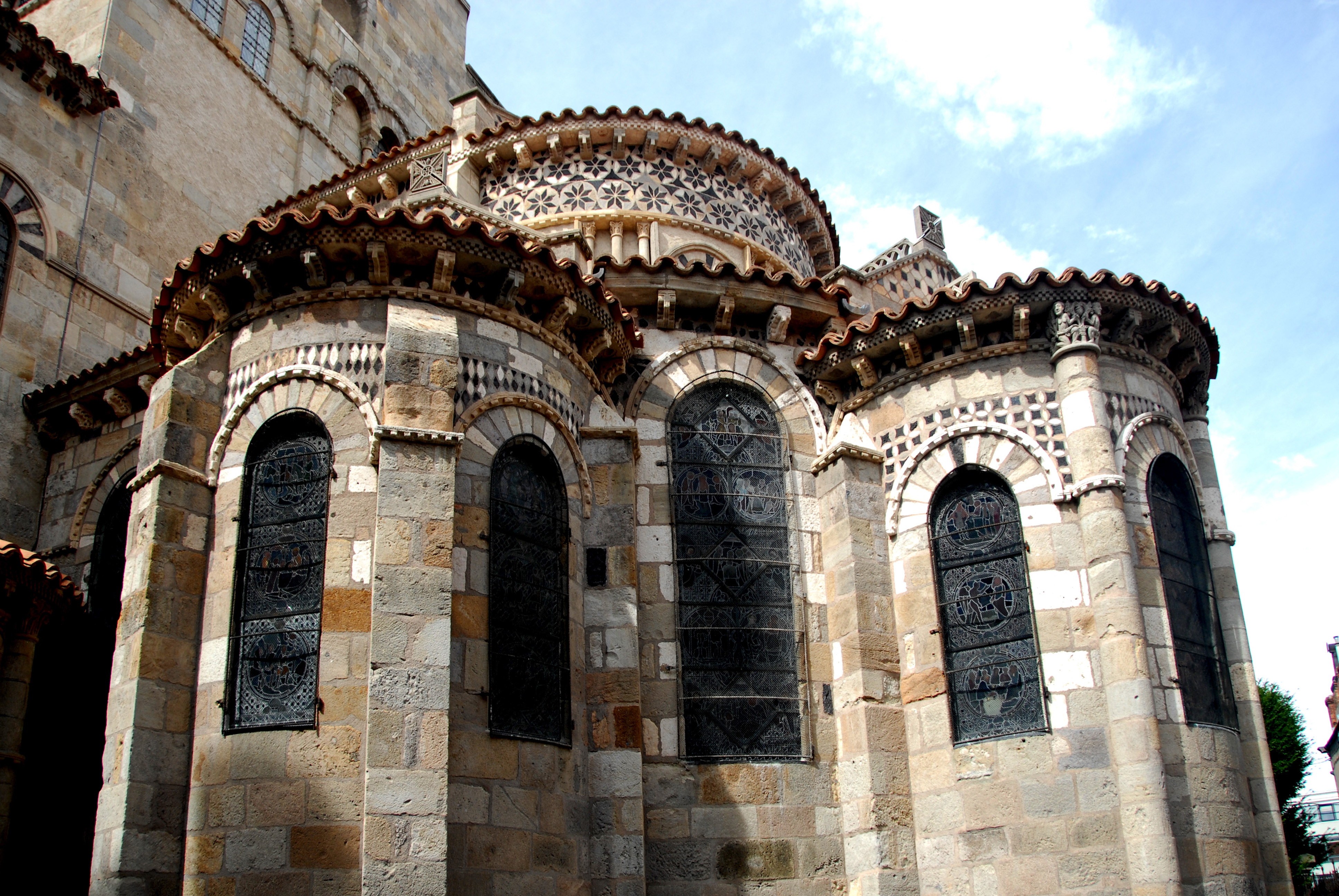 Notre-Dame du Port, 2 Chorkapellen